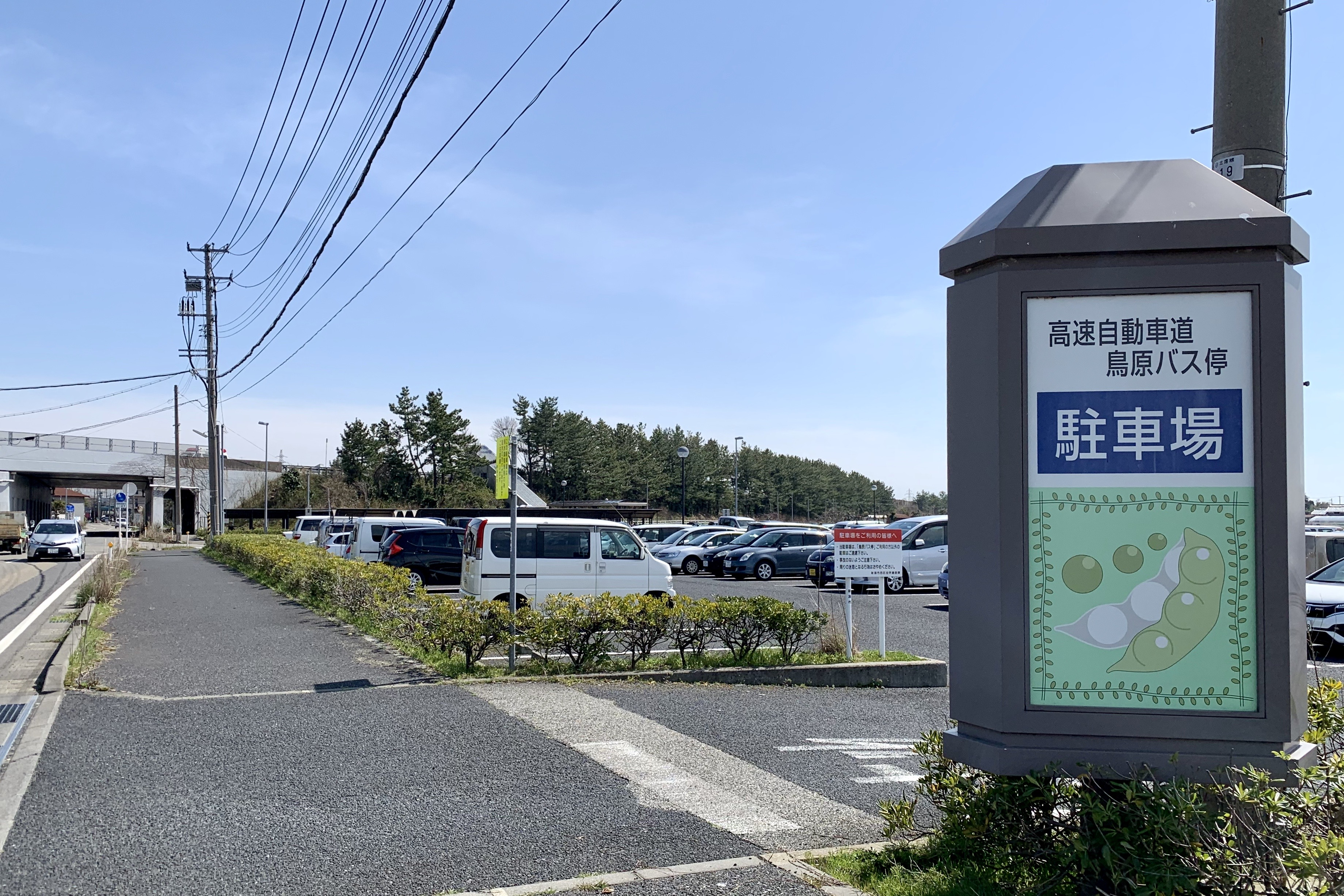 北陸自動車道・鳥原バスストップ パークアンドライド駐車場（2020年3月）